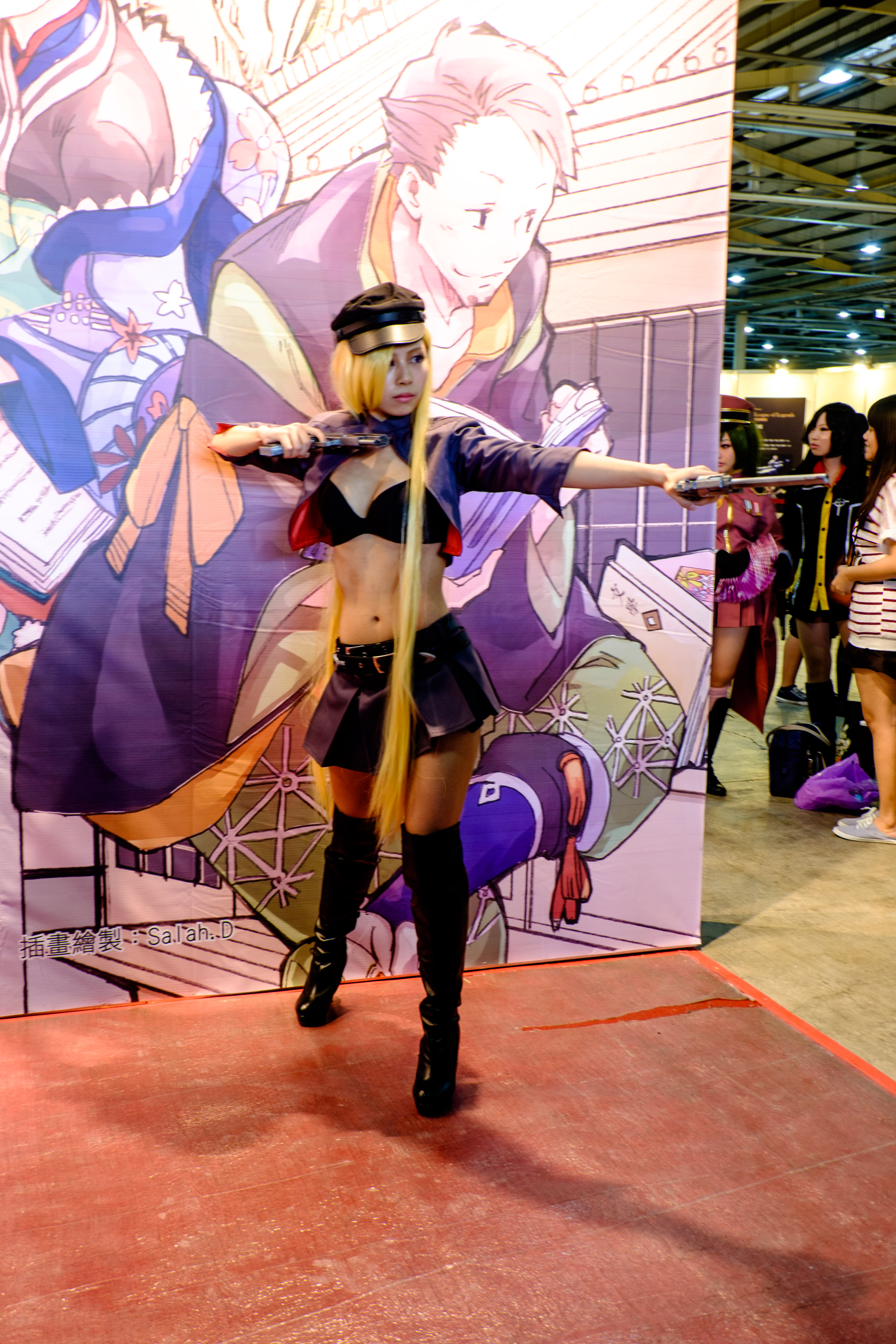 2015臺中動．漫．力第一日中午，＜ノラガミ＞毘沙門天Cosplayer。